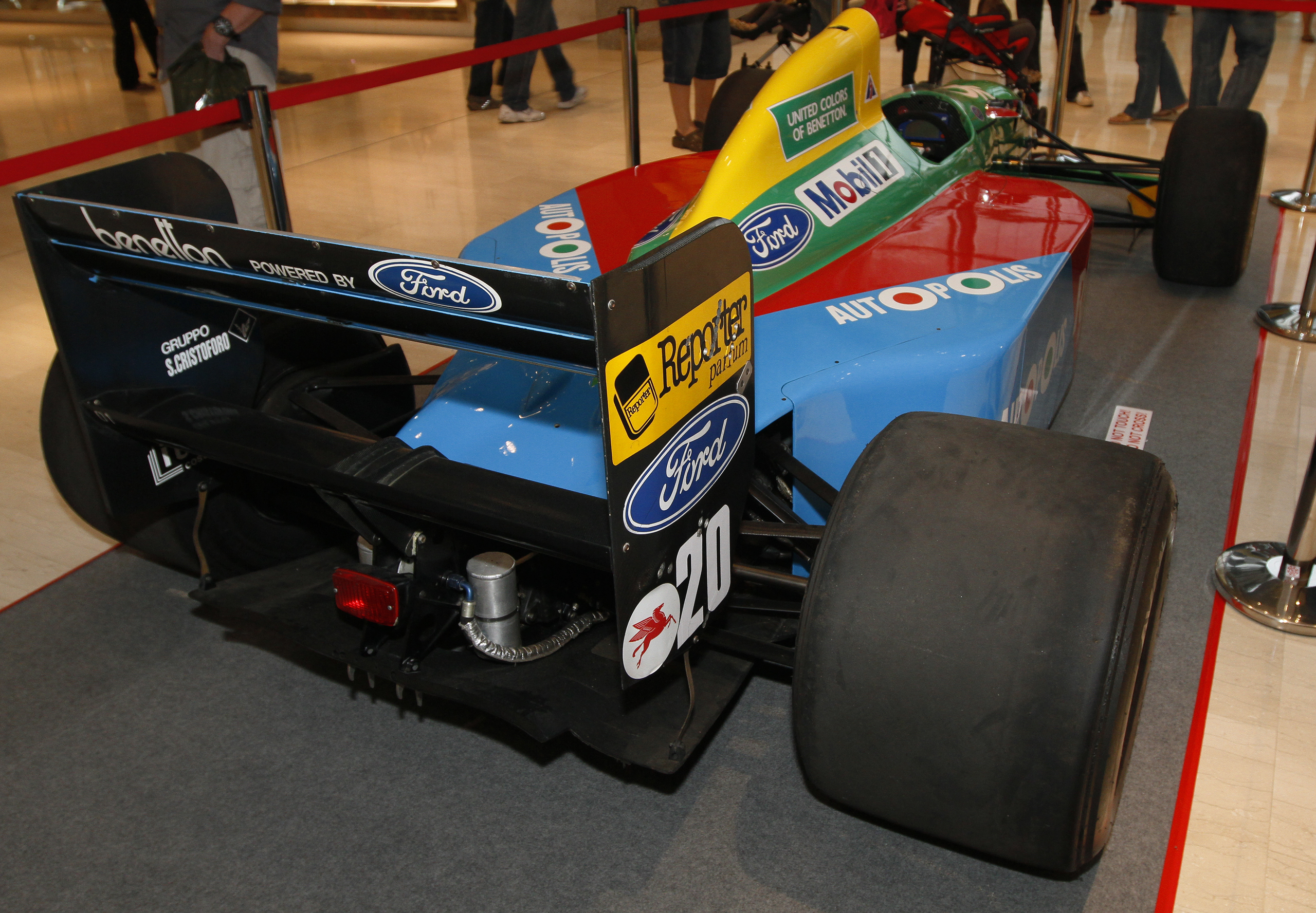 Pavilion Pit Stop 2010: Benetton B190